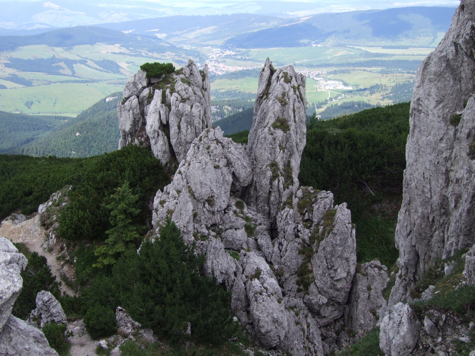 Rzędowe Skały na Siwym Wierchu (Tatry Zachodnie)